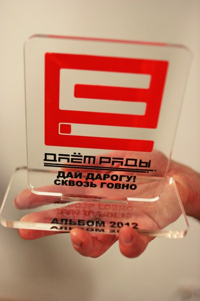 Еврорадио Минск Дай дарогу! альбом 2012